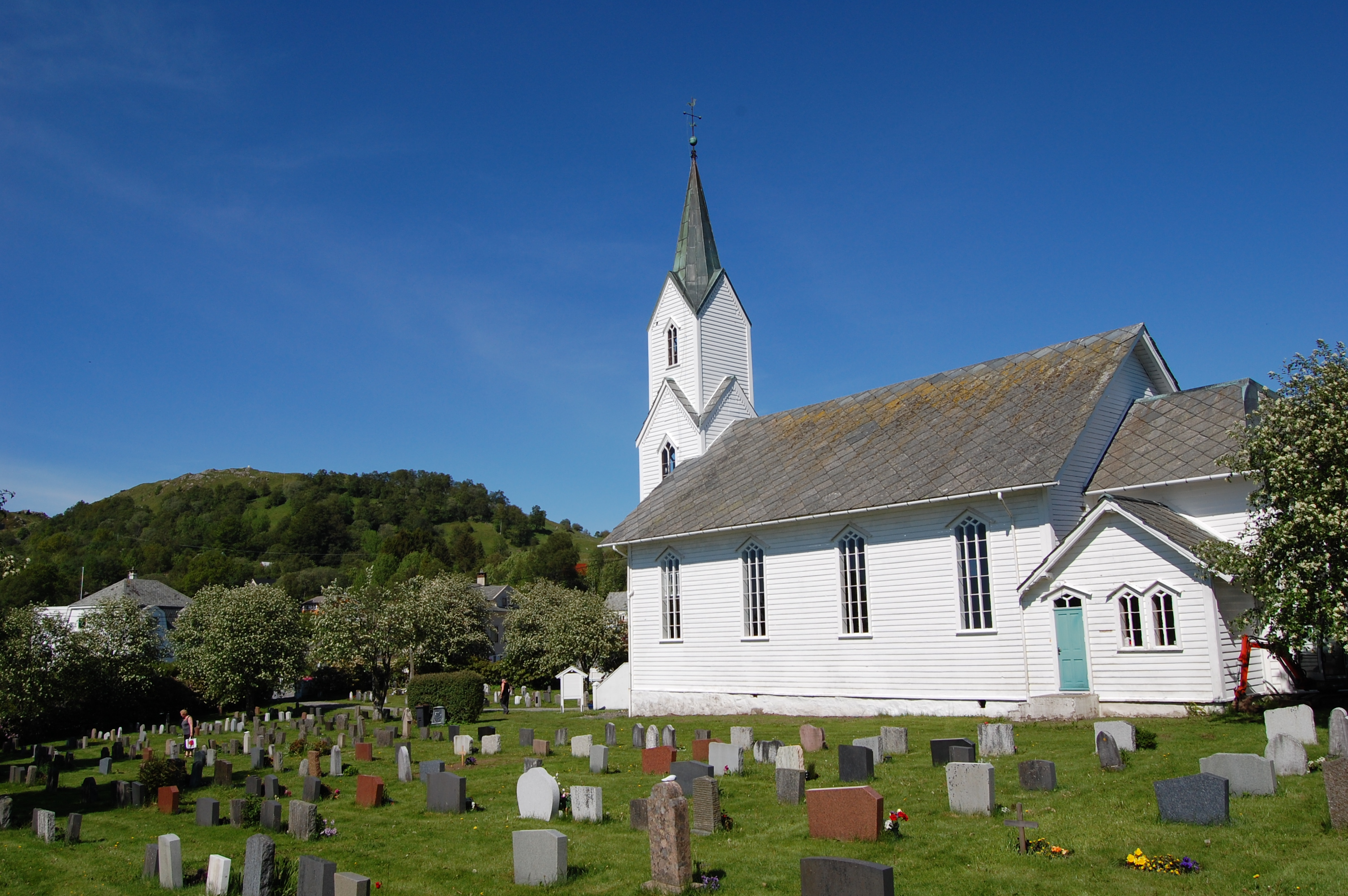 Sæbø kirke